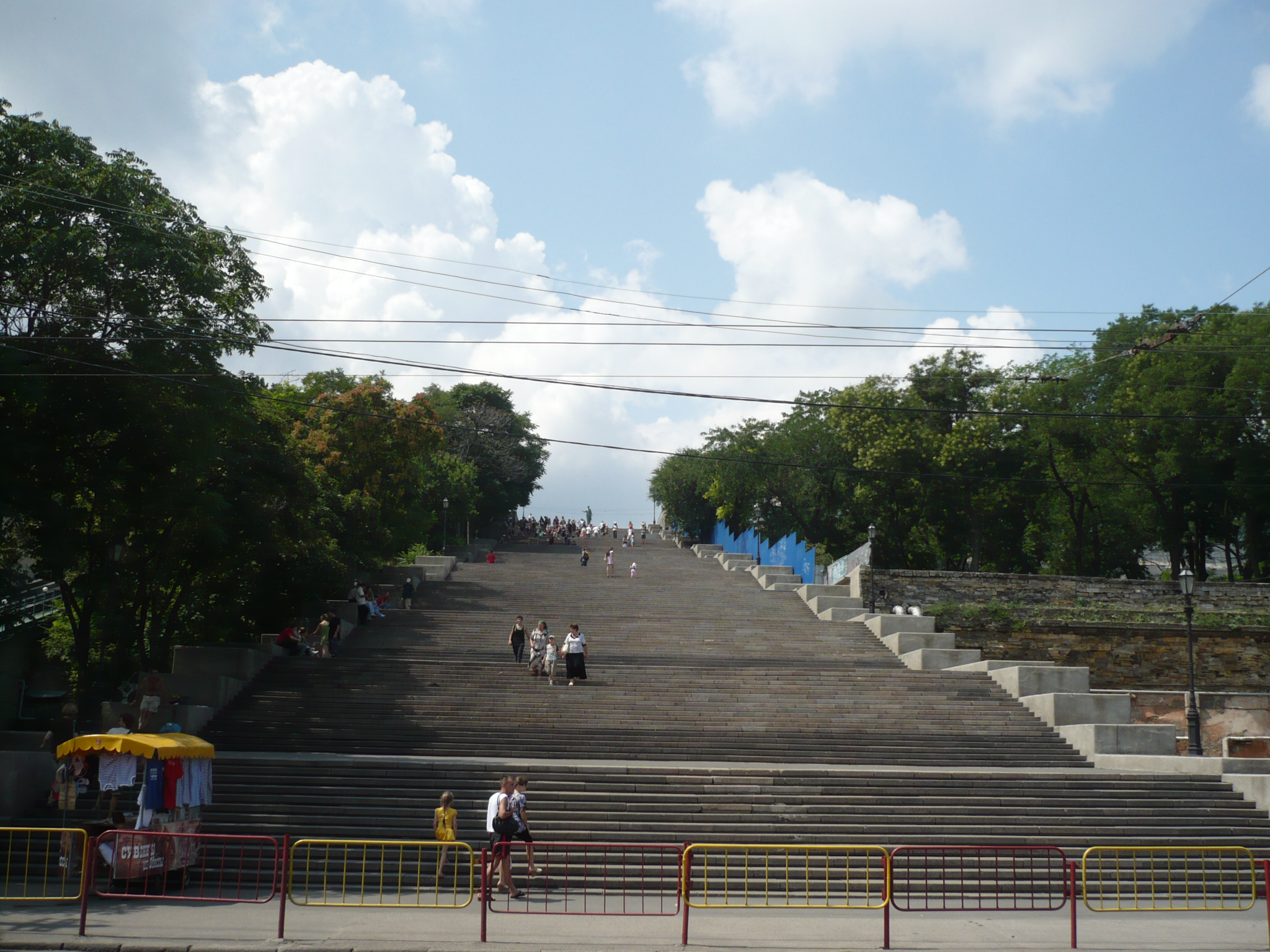 Schody Potiomkinowskie